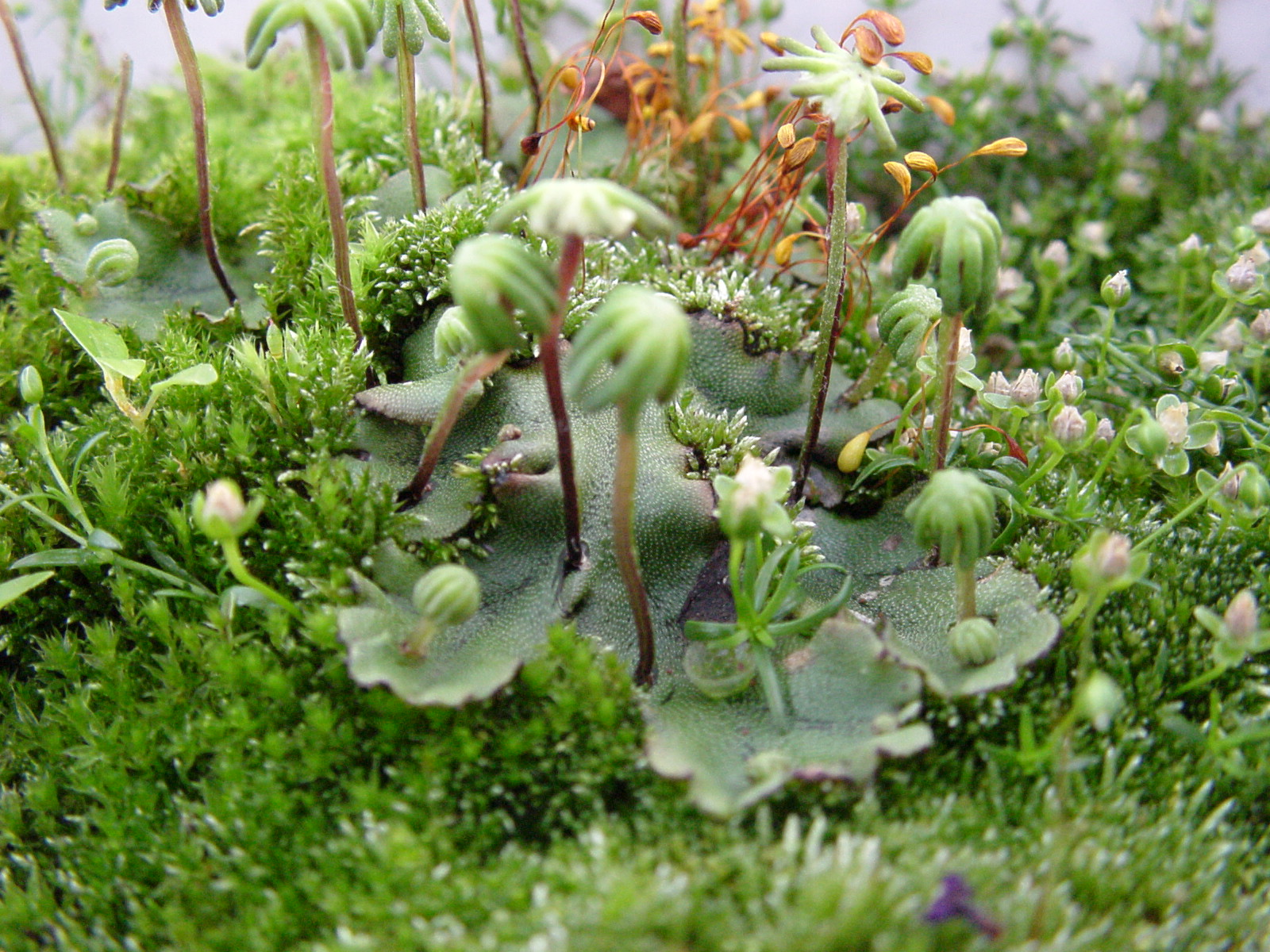 Moos